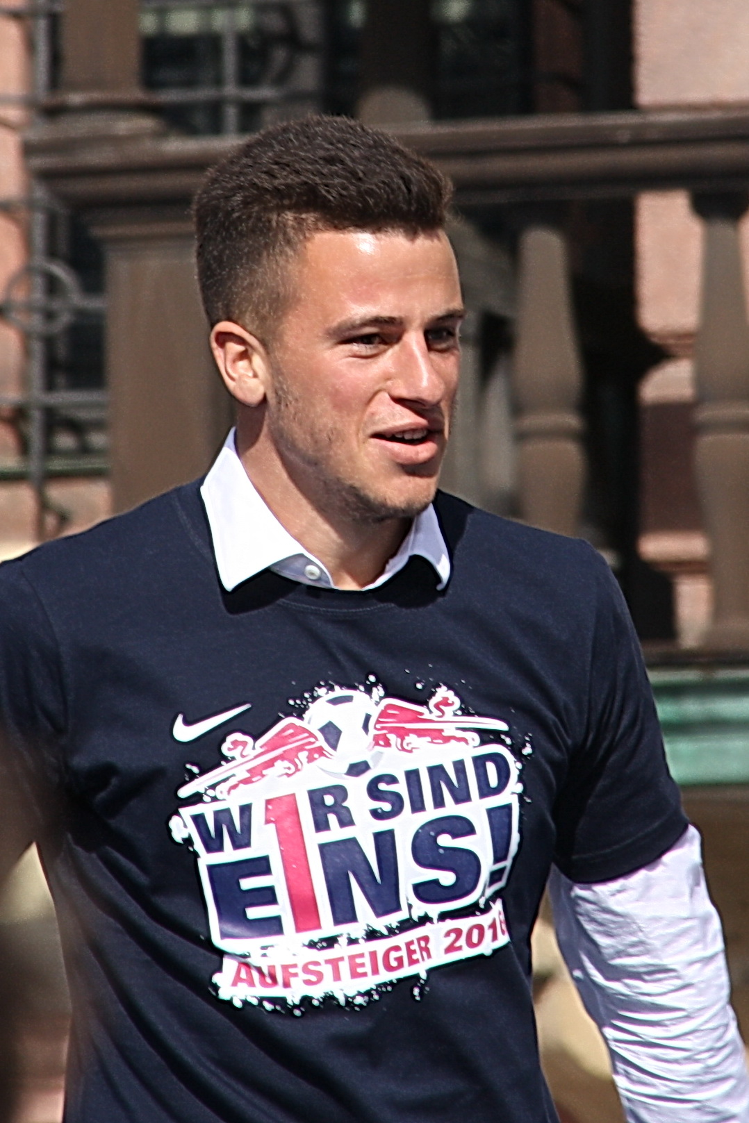 Diego Demme bei der Aufstiegsfeier RB Leipzig 2016